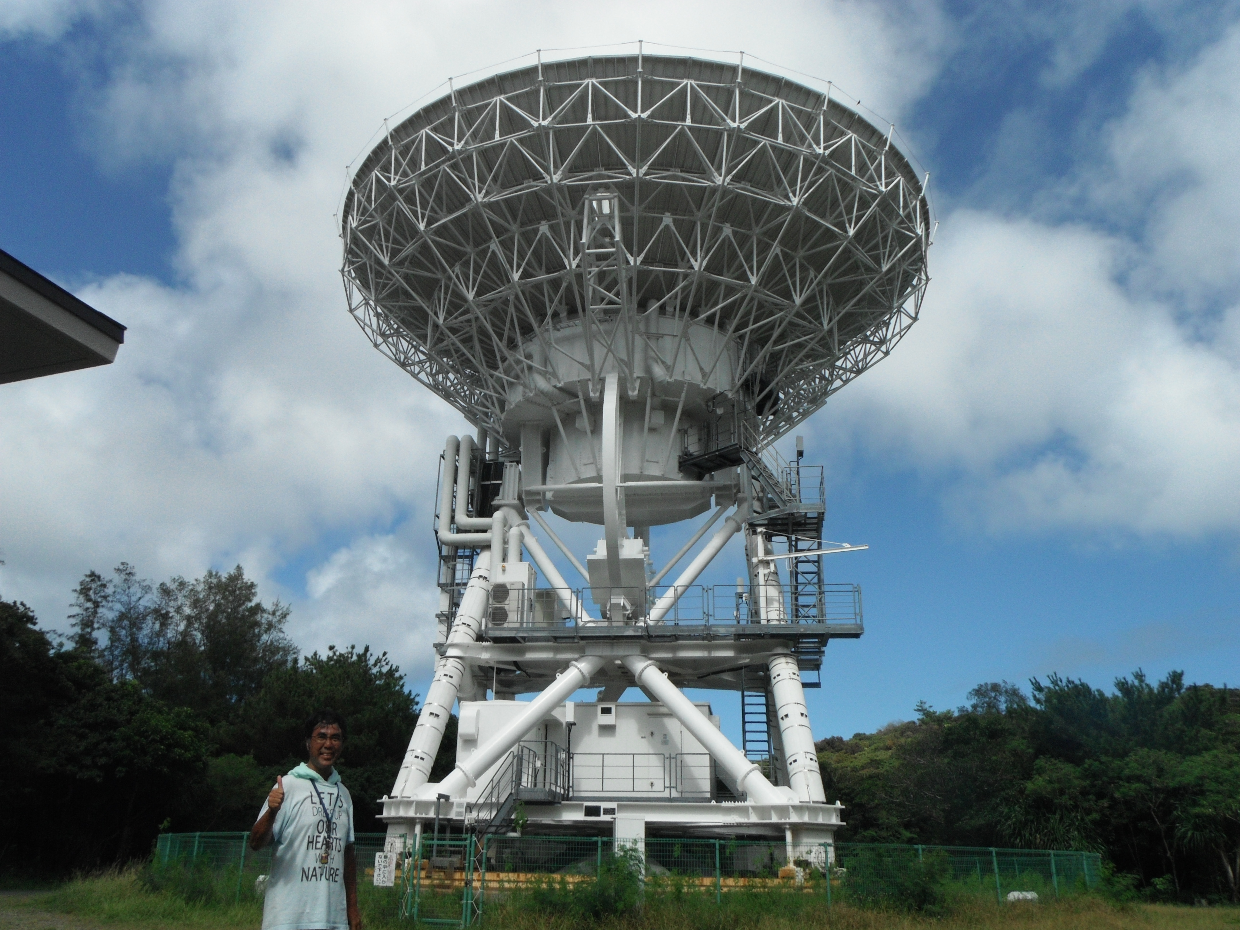 国立天文台 VERA小笠原観測局 20160920に敷地内で撮影